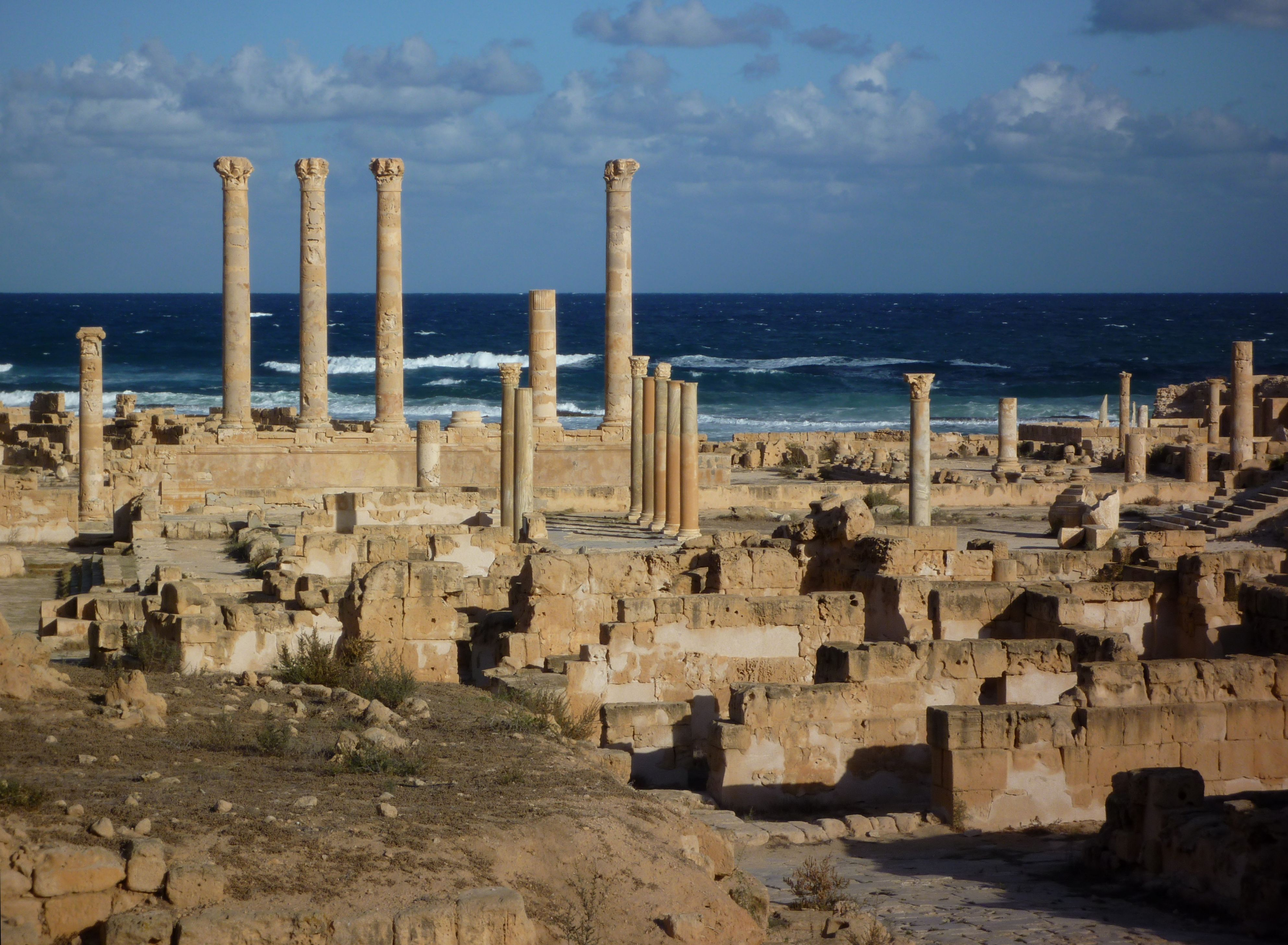 Sabratha - Säulen des Jupiter-Tempels